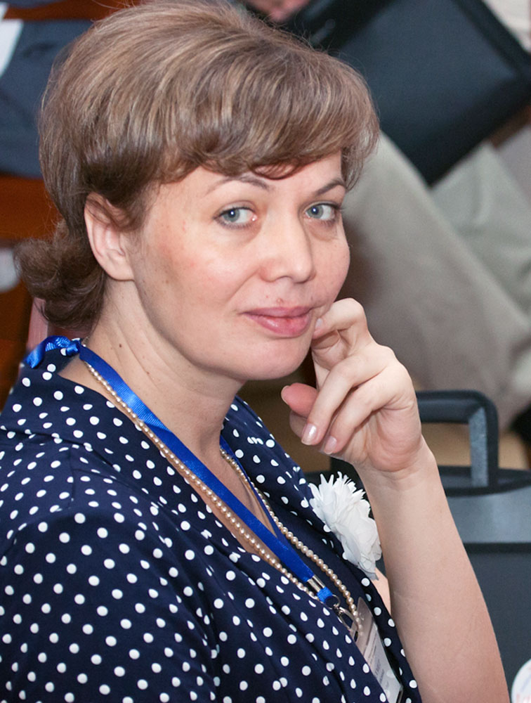 Ольга Николаевна Бахмет (род.1969) — российский почвовед, доктор биологических наук, член-корреспондент РАН